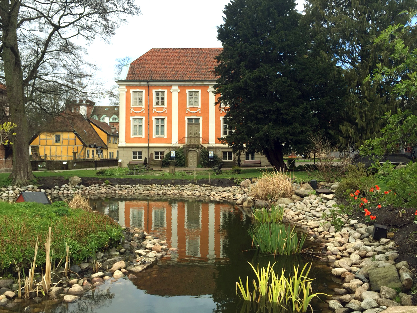 Herrehuset på Kulturen i Lund. Byggnaden med tillhörande tomt köptes 1890 av Kulturhistoriska föreningen för södra Sverige.